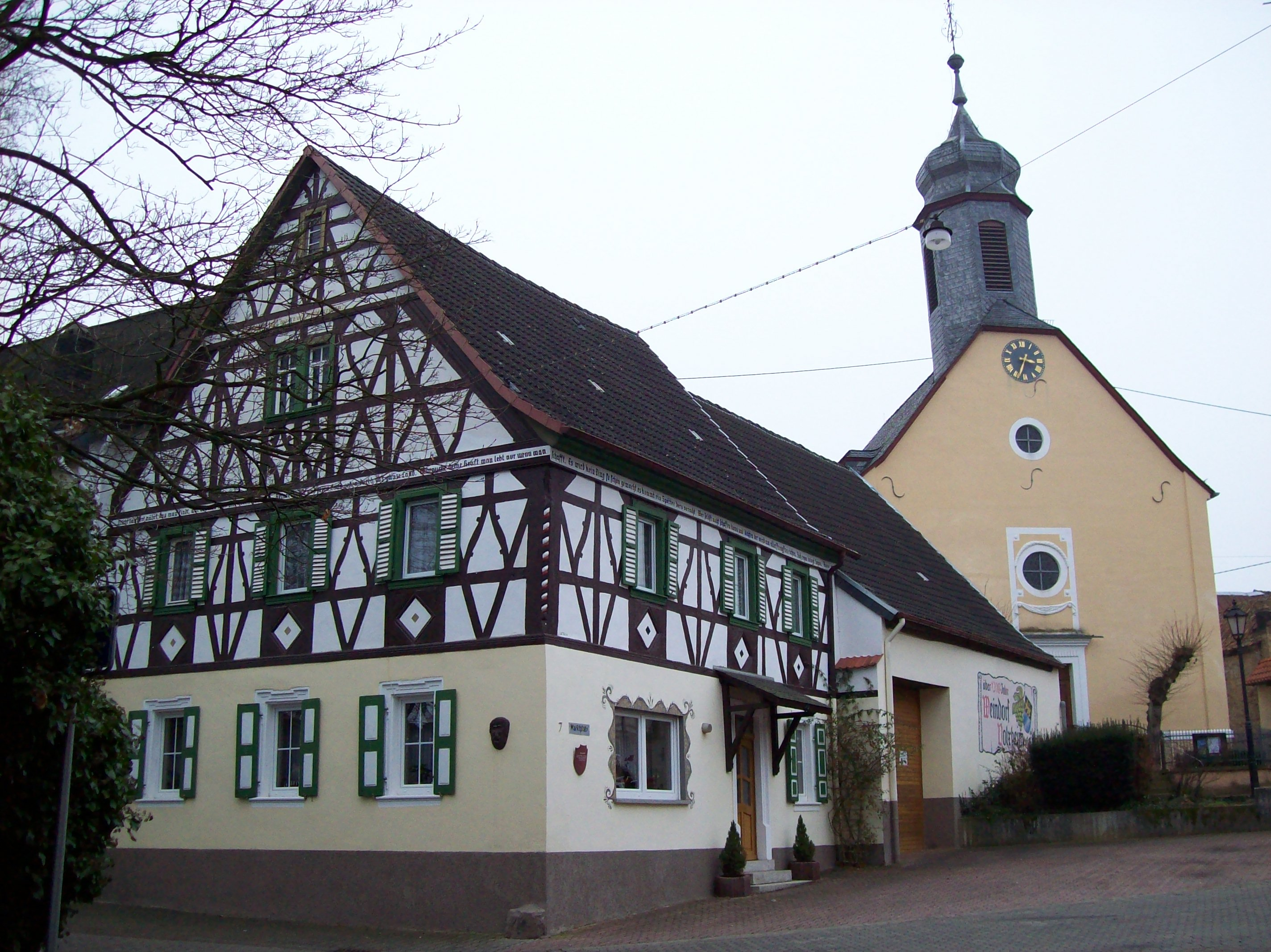 Evangelische Kirche in Volxheim / Rheinland Pfalz mit historischem Fachwerkhaus